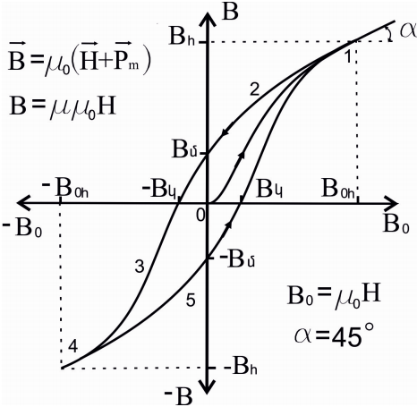 դասֆդսացն